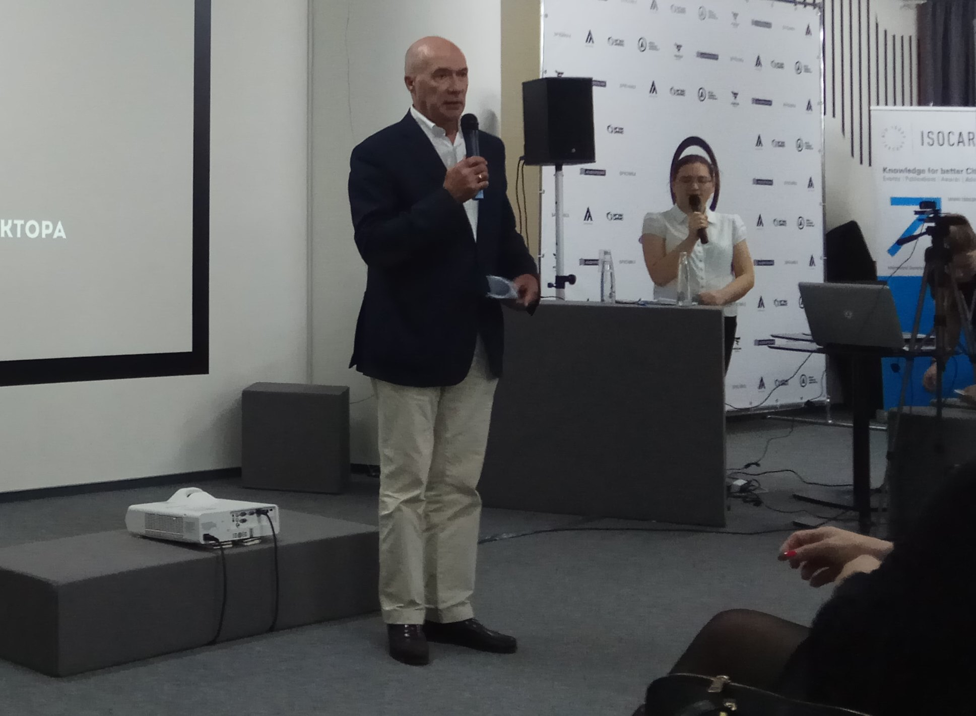 Архитектор Андрей Боков